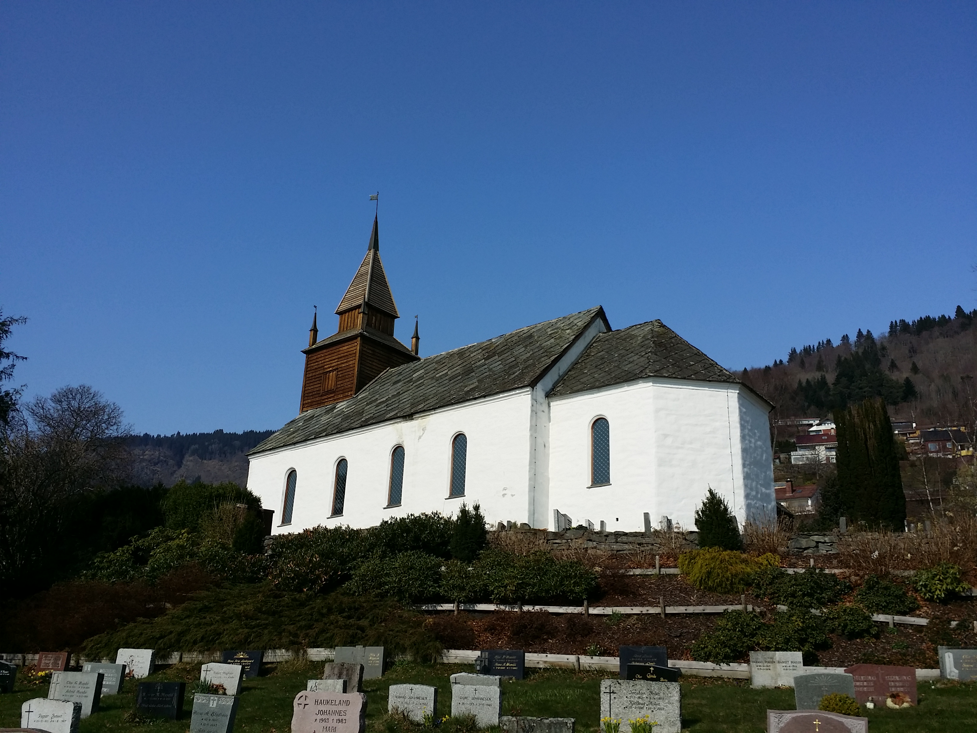 Leikanger kyrkje, i Leikanger kommune